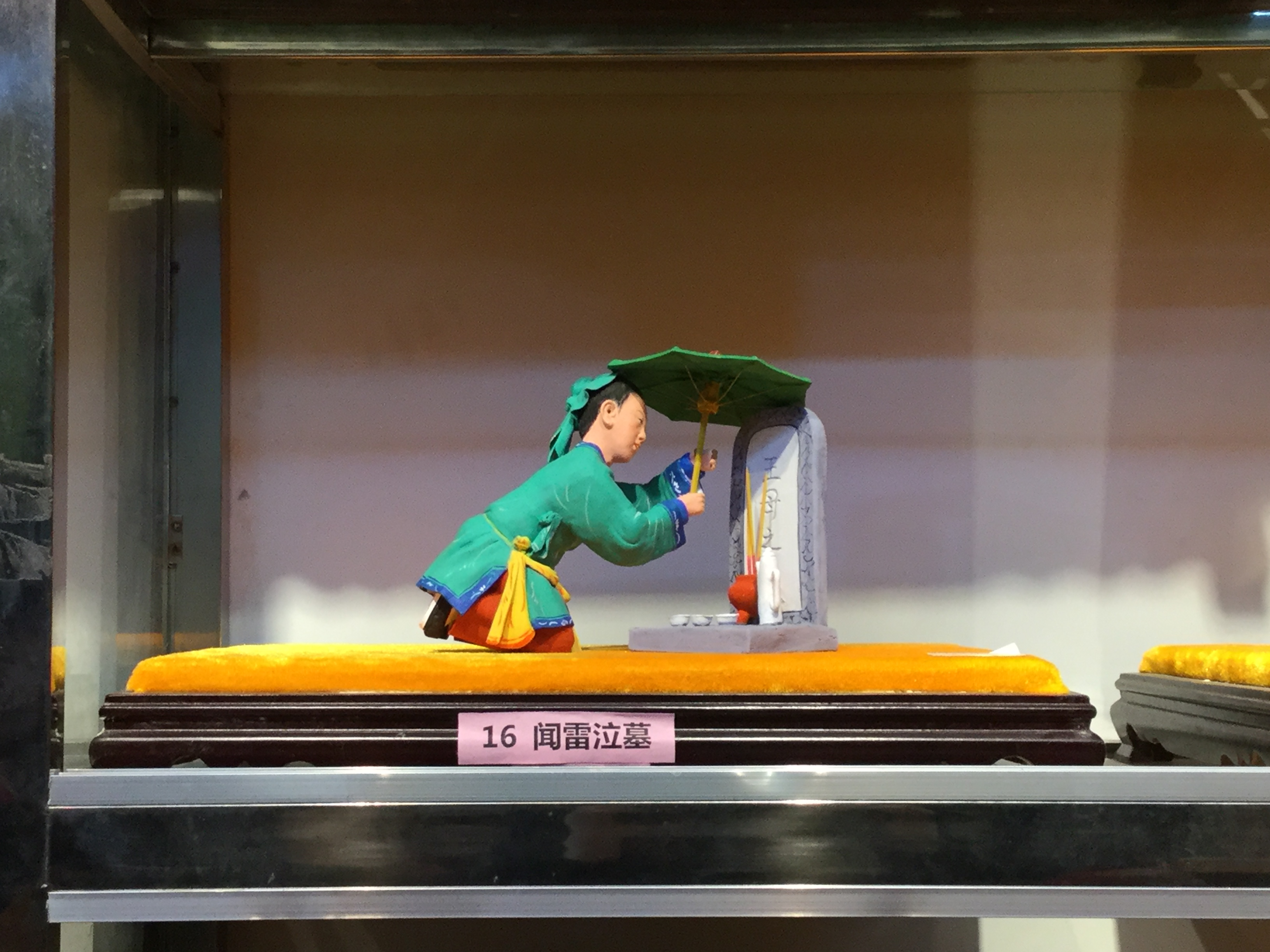 翁仔灯《闻雷泣墓》，摄于2018年3月2日。